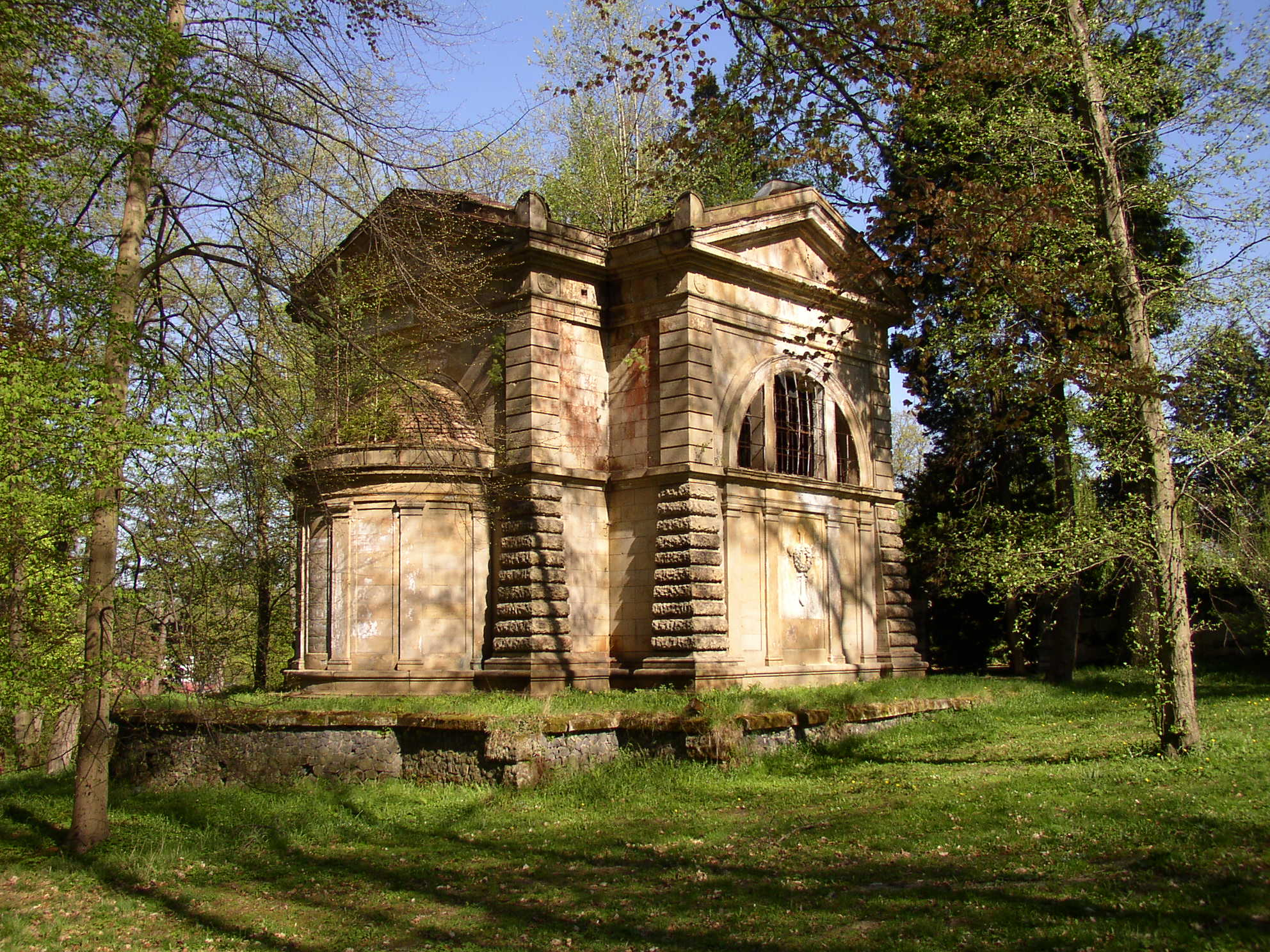 Hrobka Dittrichova s kotelnou (Krásná Lípa), nový hřbitov, Krásná Lípa